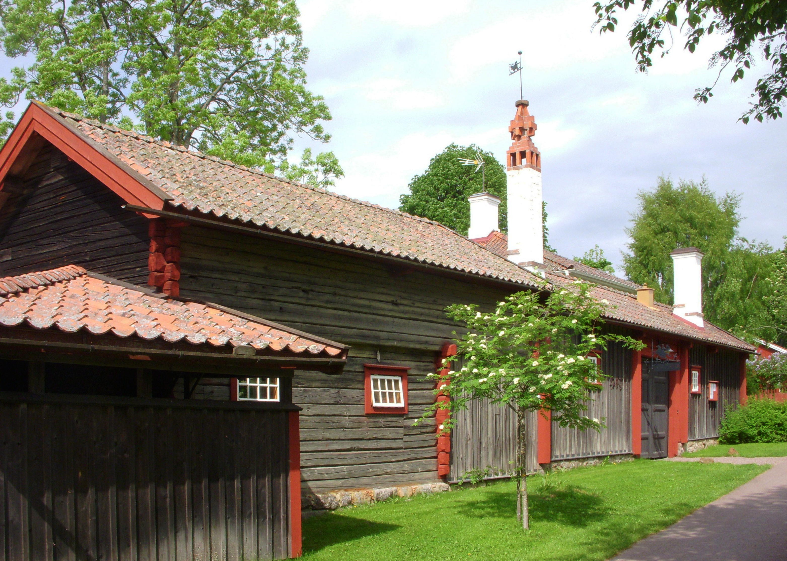 Karlfeldtsgården Sångs i Sjuagre, byggnaderna mot byvägen (vävstuga och stall)